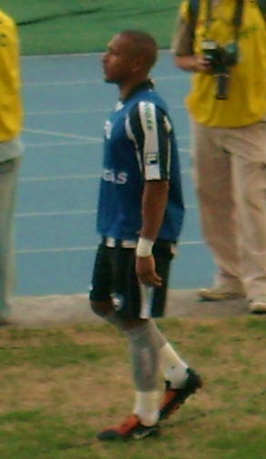 Victor Simões, atacante de futebol, durante aquecimento em defesa do Botafogo de Futebol e Regatas.